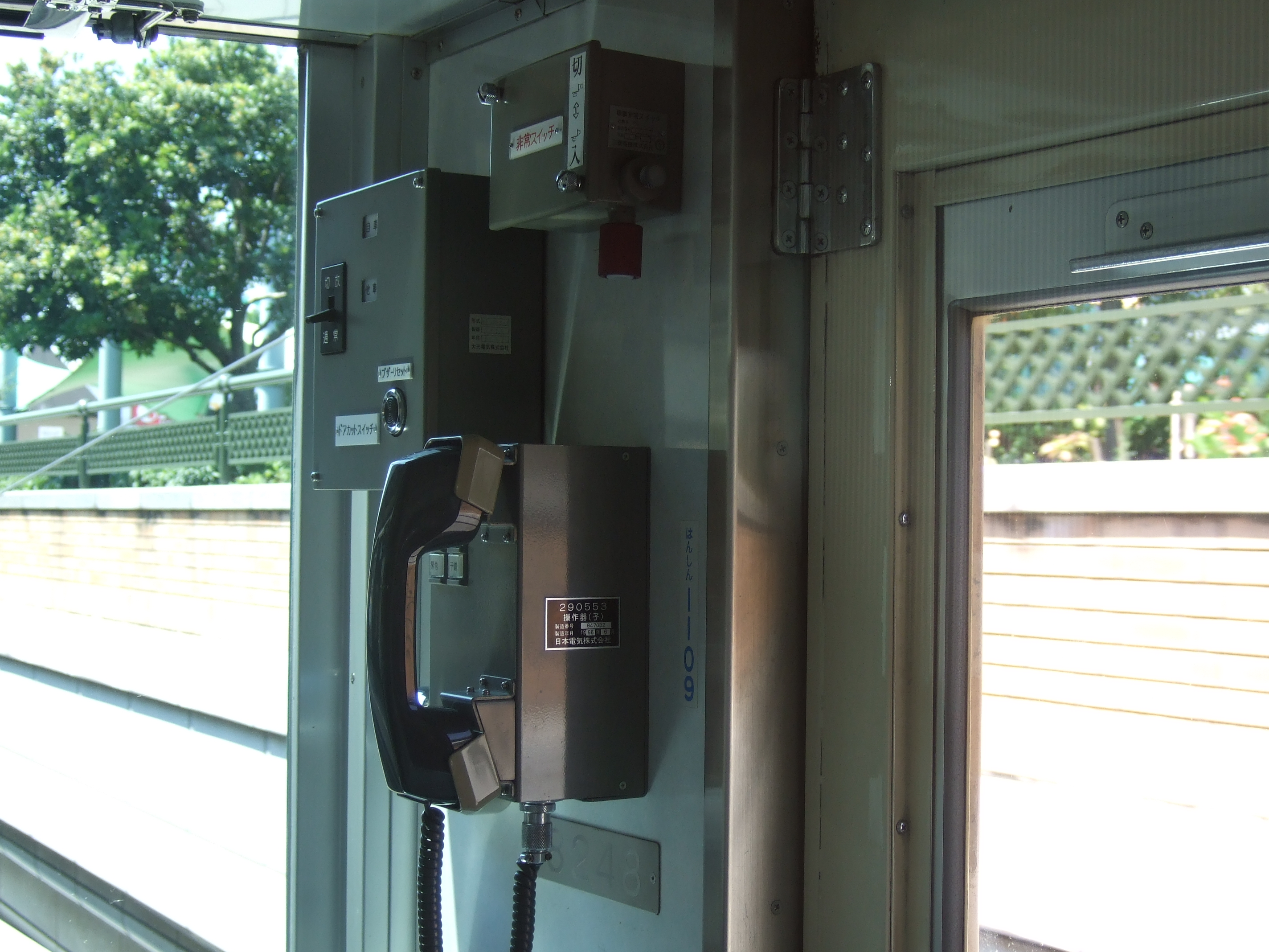 阪神8000系に装備されている、ドアカットスイッチ。